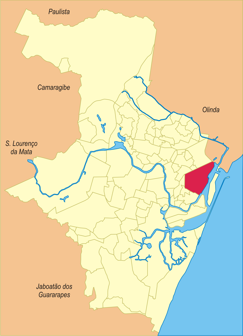 Localização do bairro em Recife